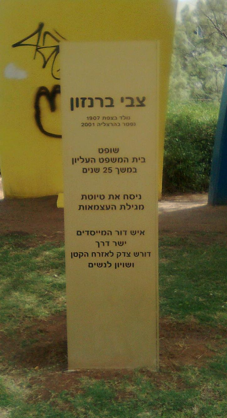 שלט לזכרו של השופט צבי ברנזון, בכניסה לחוף השרון בהרצליה